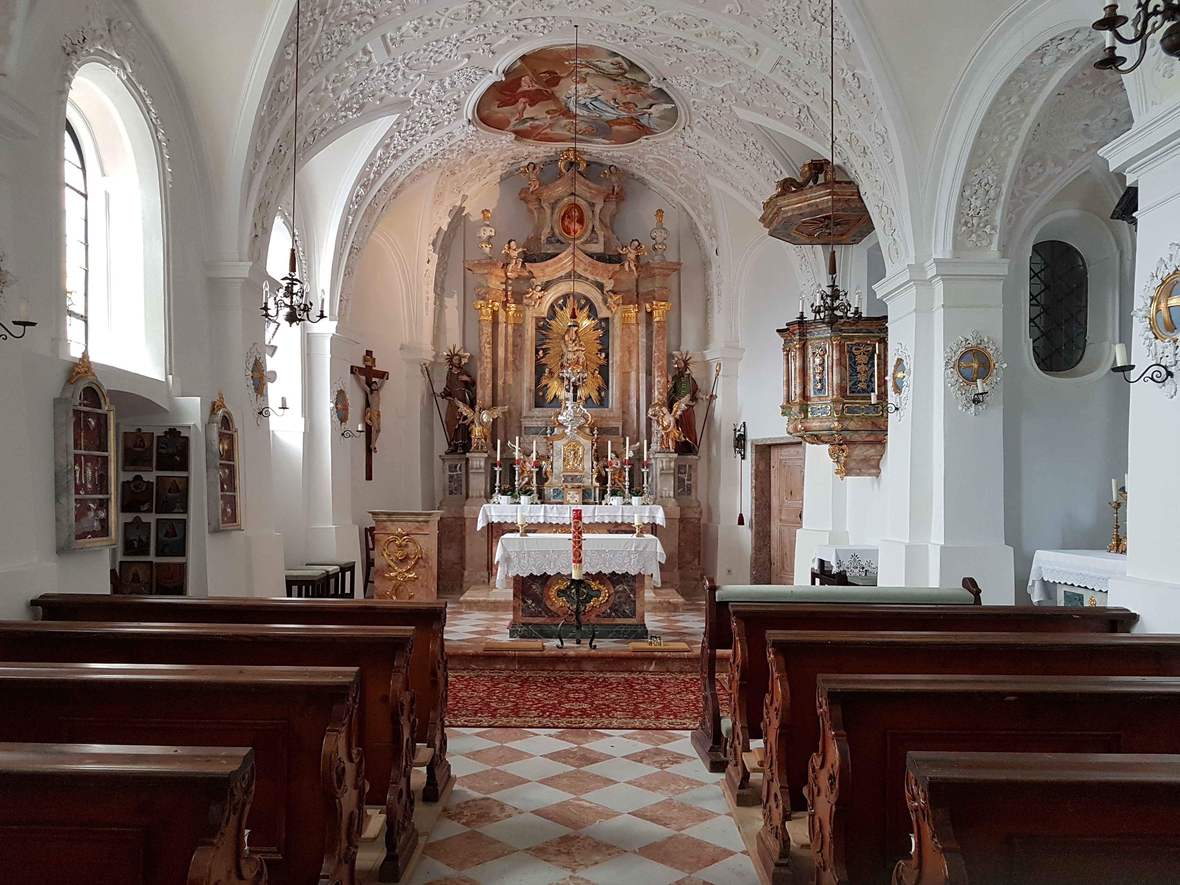 Wallfahrtskirche Heiligwasser, Innenraum vom Gitter aus